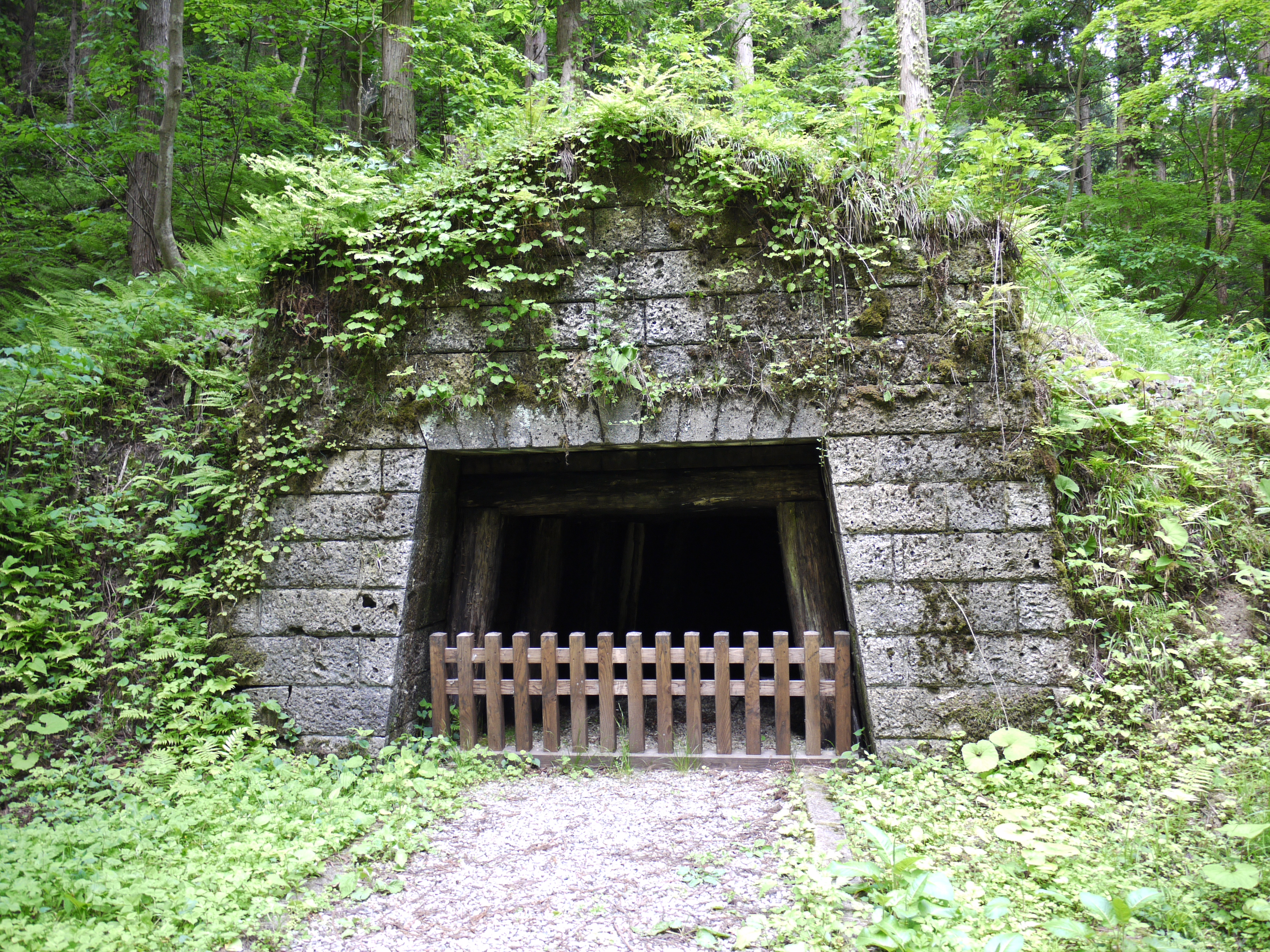 院内銀山 （秋田県）御幸坑